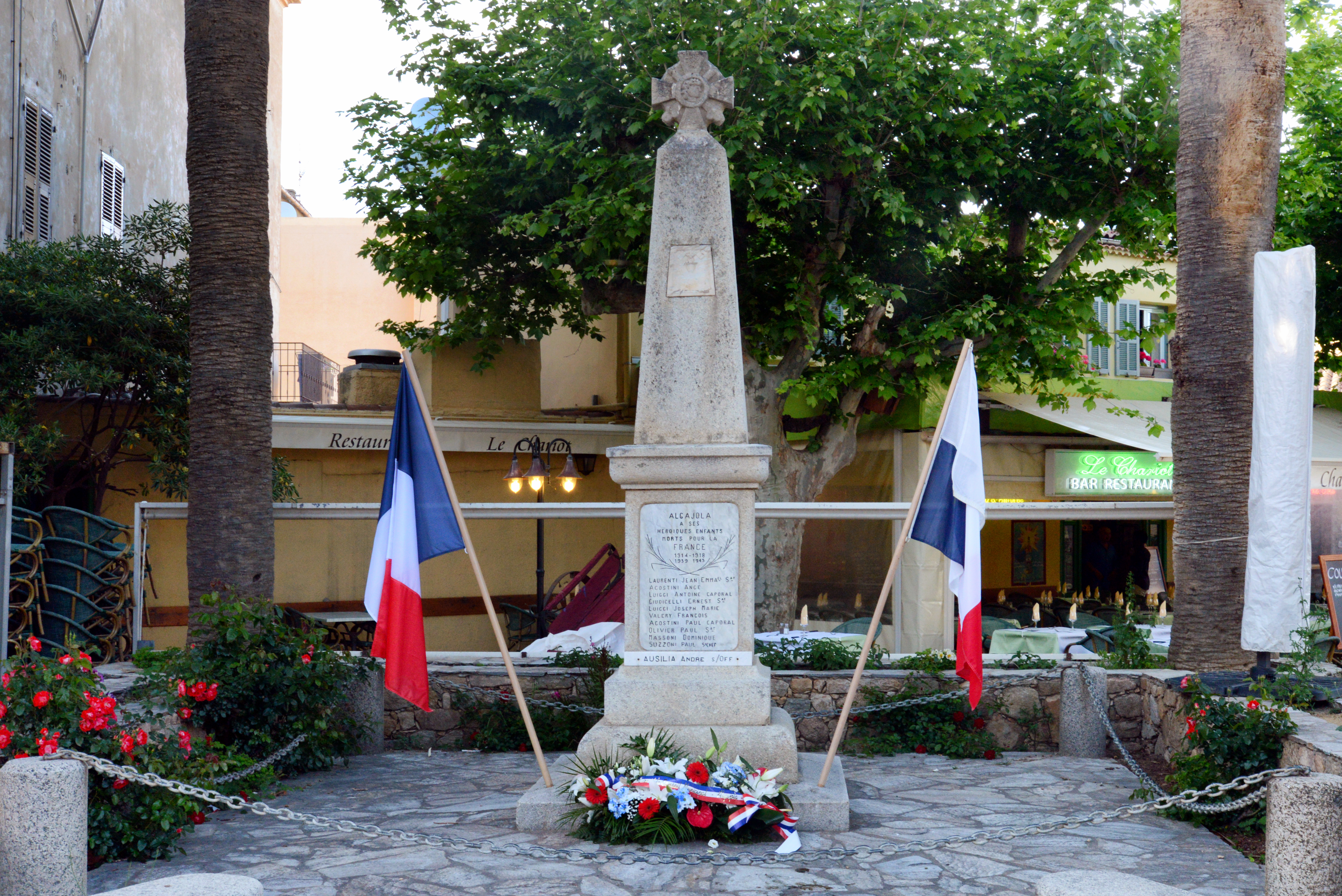 Algajola, Balagne (Corse) - Monument aux moprts